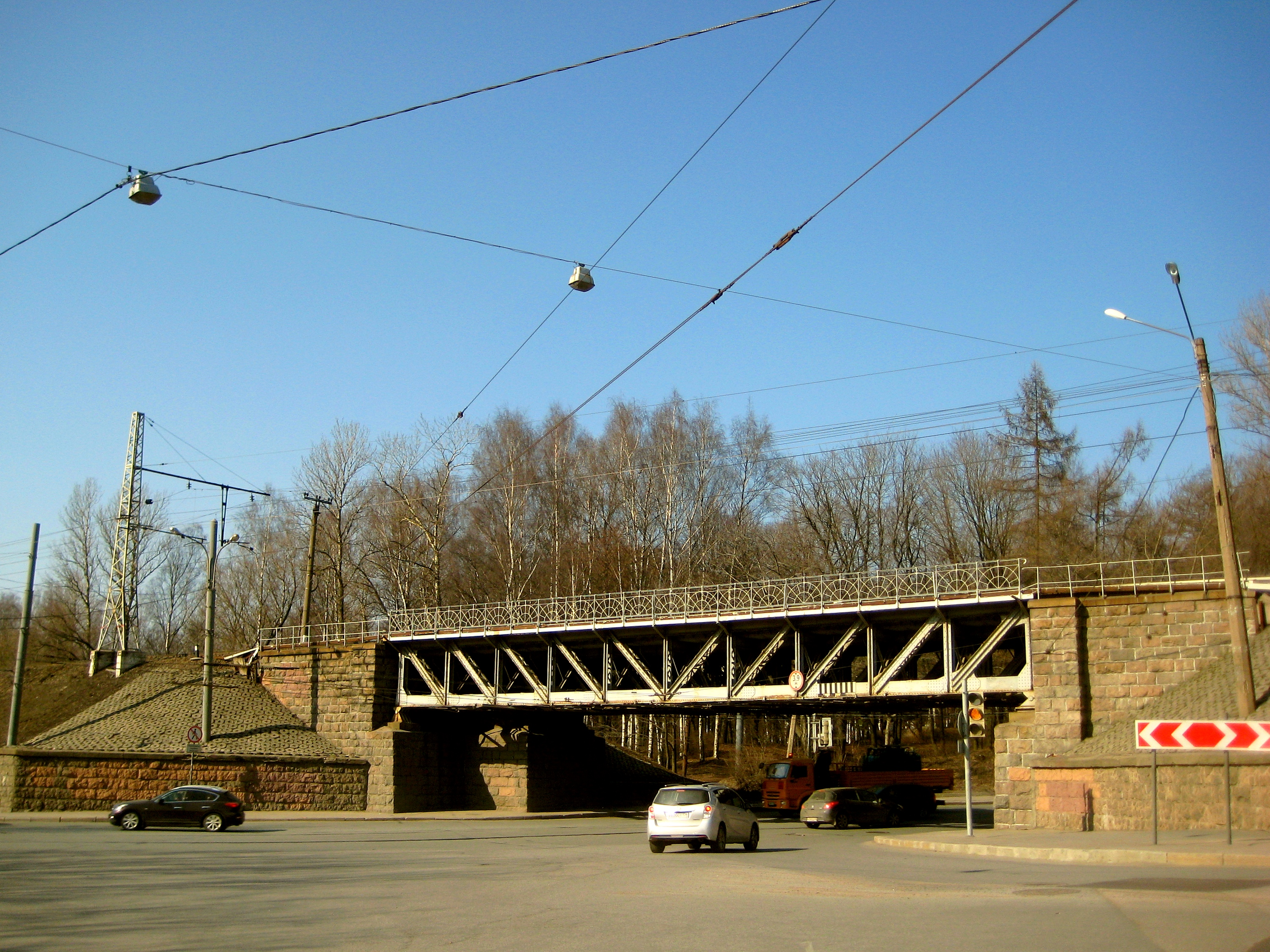 Санкт-Петербург. Железнодорожный путепровод над улицей Карбышева